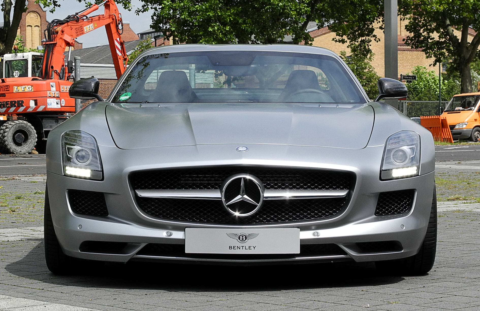 Mercedes-Benz SLS AMG (C 197)